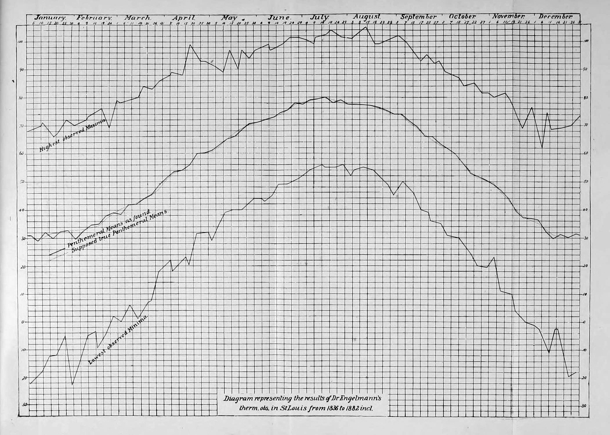 Temperaturklimadiagramm von St. Louis von 1836 bis 1882.